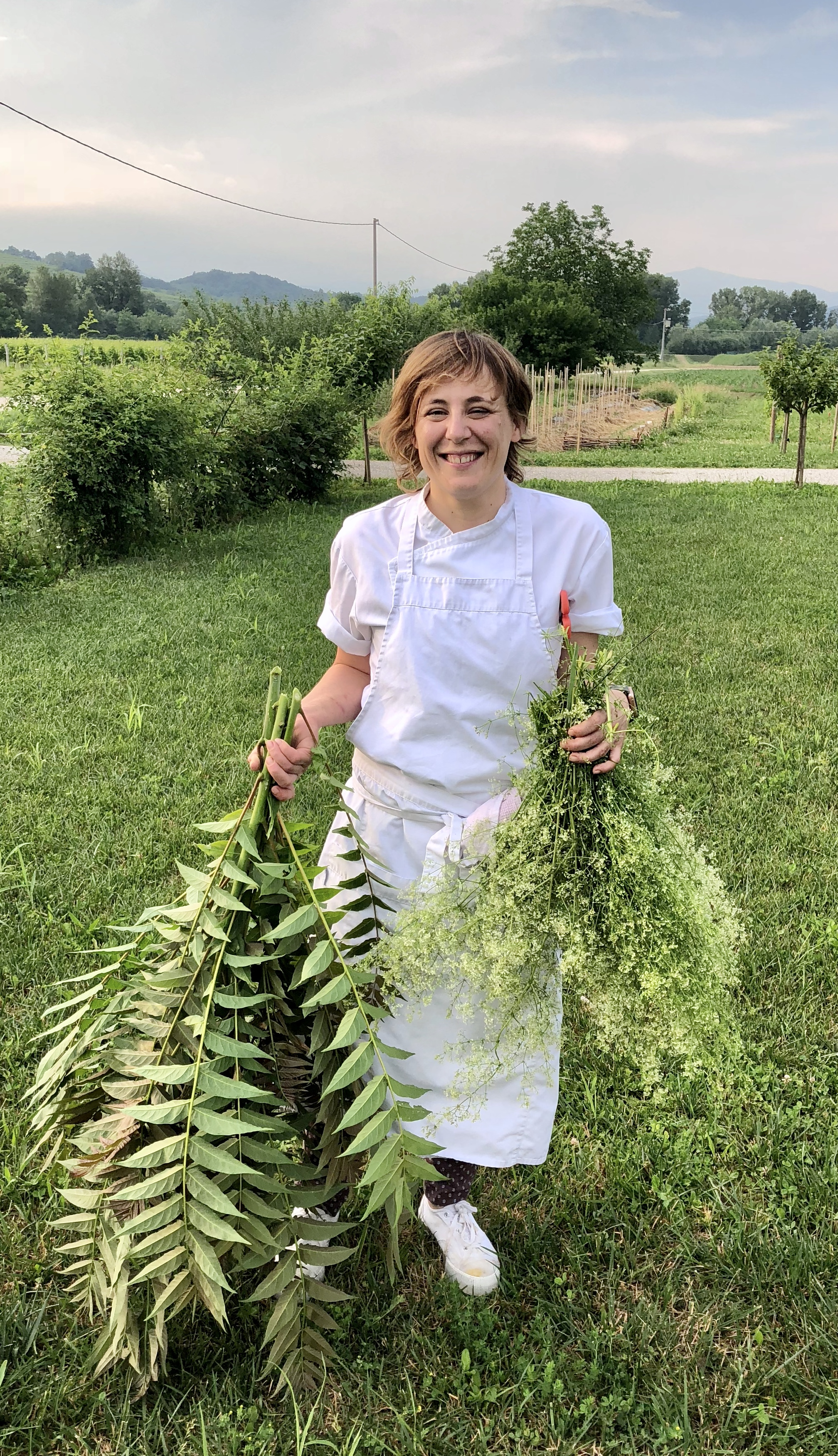 Antonia Klugmann nel suo orto